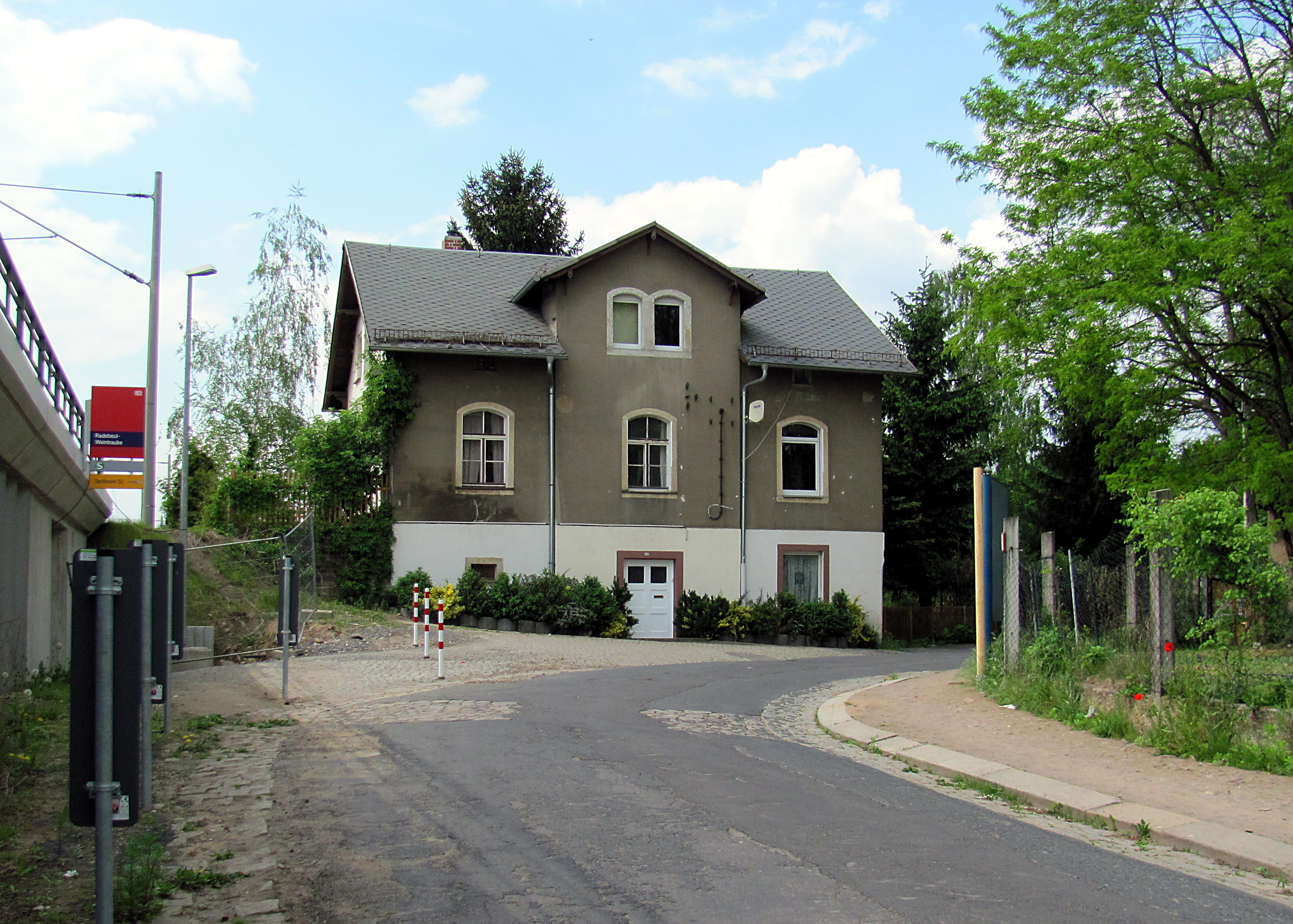 Radebeul, Haltepunkt Radebeul-Weintraube: ehem. Empfangsgebäude